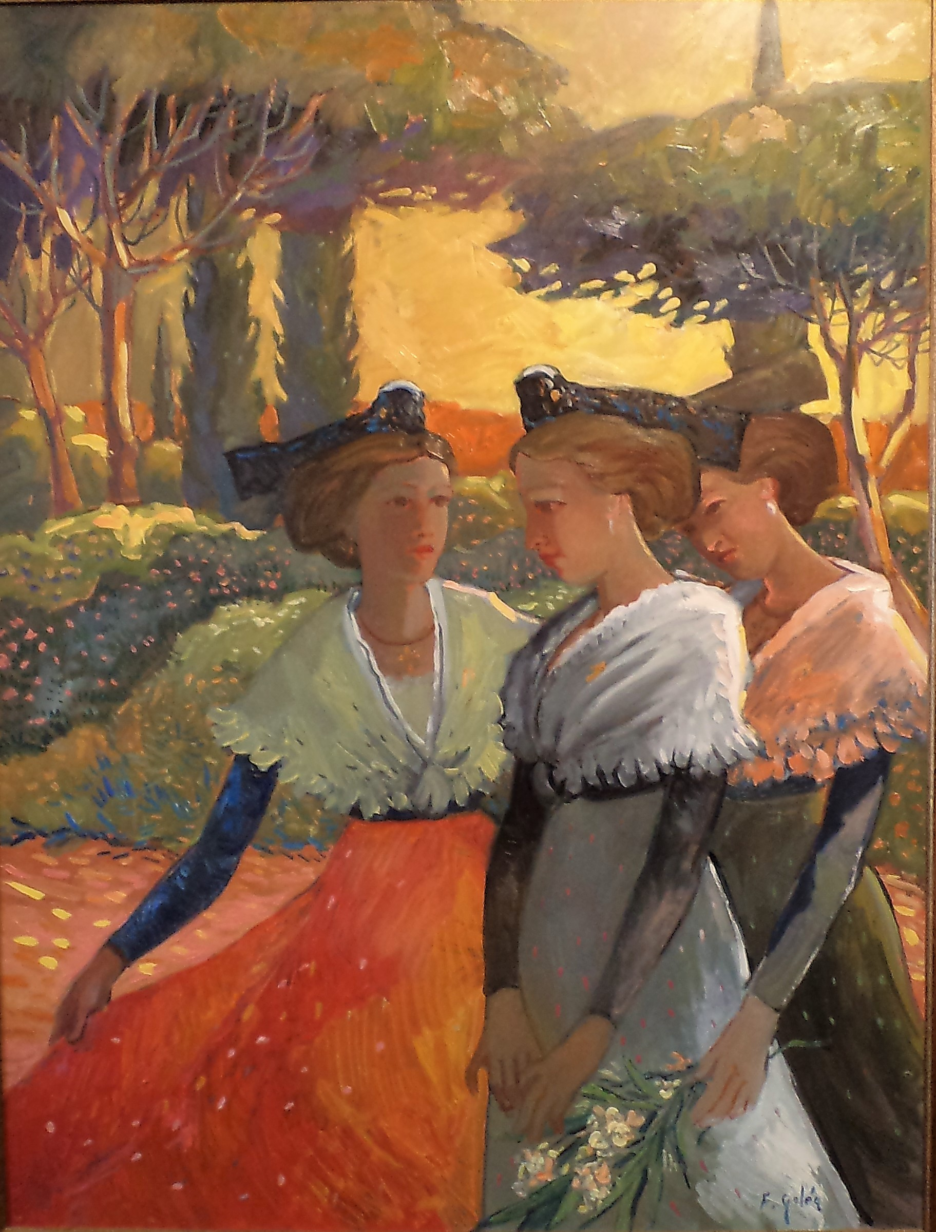 Arlésiennes sous des pins parasols Huile sur toile Hauteur :1,20 mètre. Largeur : 80 cm